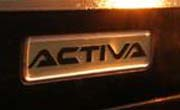 Citroen Xantia Activa Logo